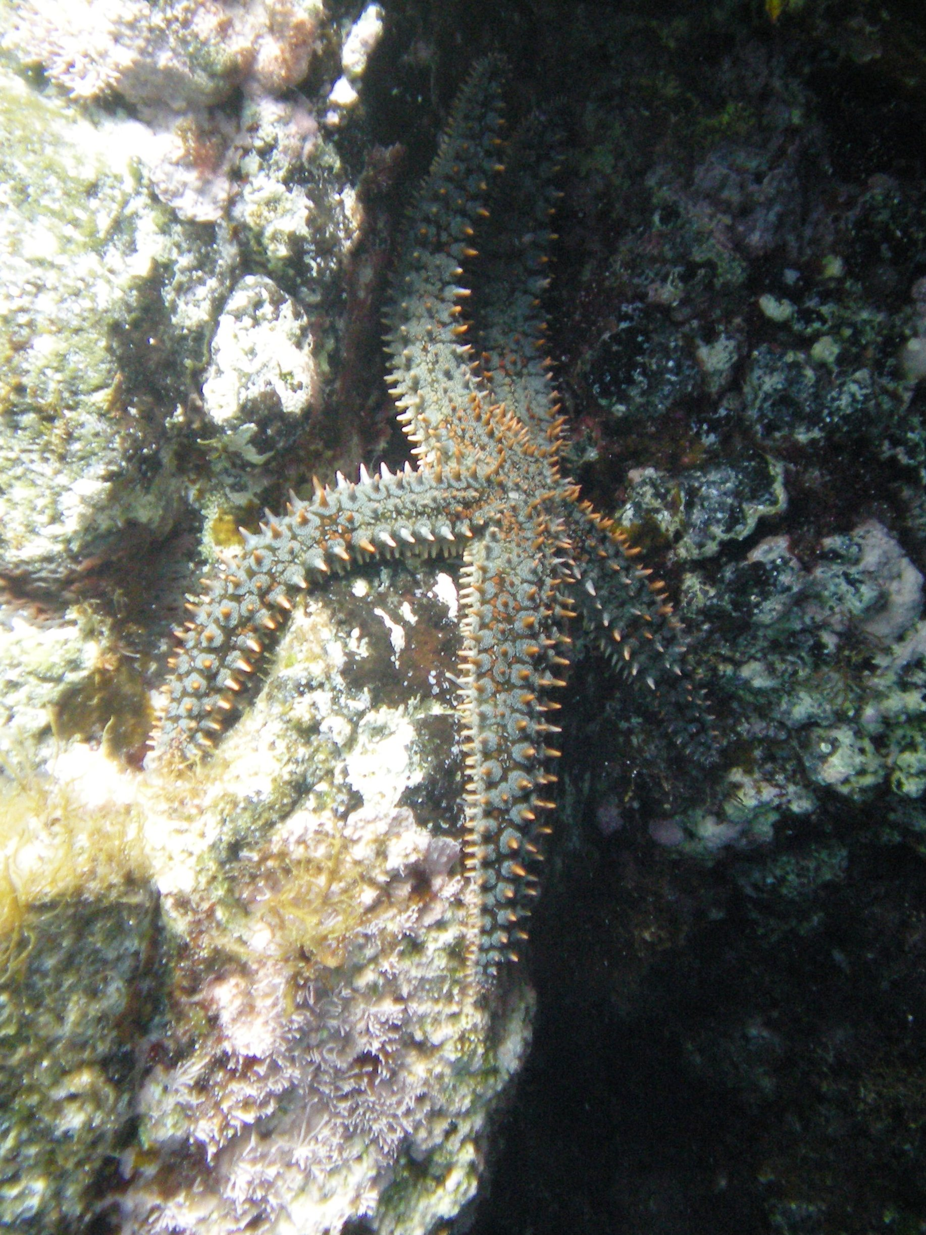 Marthasterias glacialis Linosa, Sicily